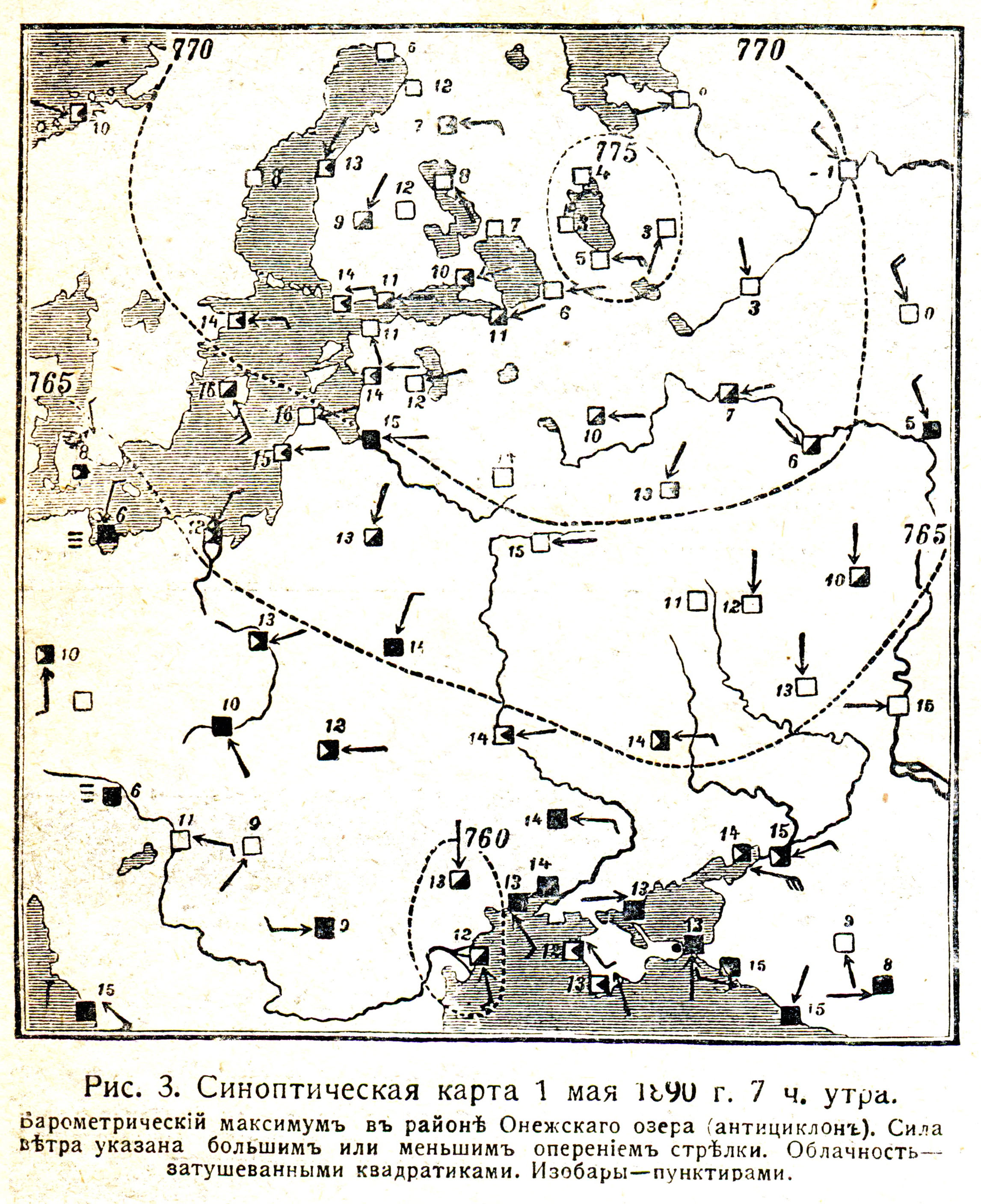 Синоптическая карта с изобарами на 7 часов 1 мая 1890 года северной, центральной, восточной Европы и Европейской России. Антициклон (775 мм ртутного столба) в районе Онежского озера. Иллюстрация из журнала Природа и люди # 31 от 4 июня 1915 года. Иллюстрация к статье: А.А. Кондиайн. "Как предсказывают погоду?"